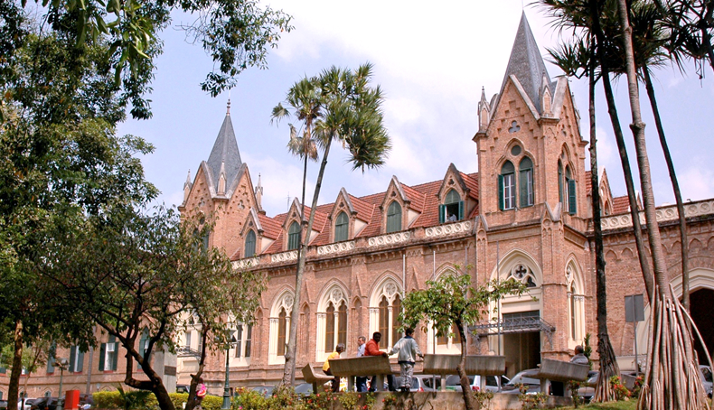 Irmandade da Santa Casa de Misericórdia de São Paulo Todos os direitos reservados.